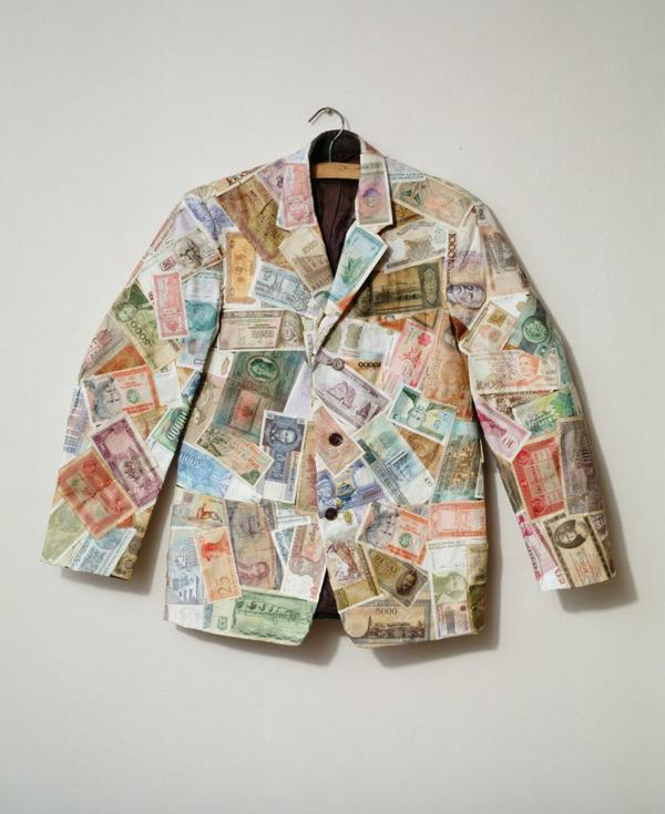 Otis Laubert - Zbohatlik